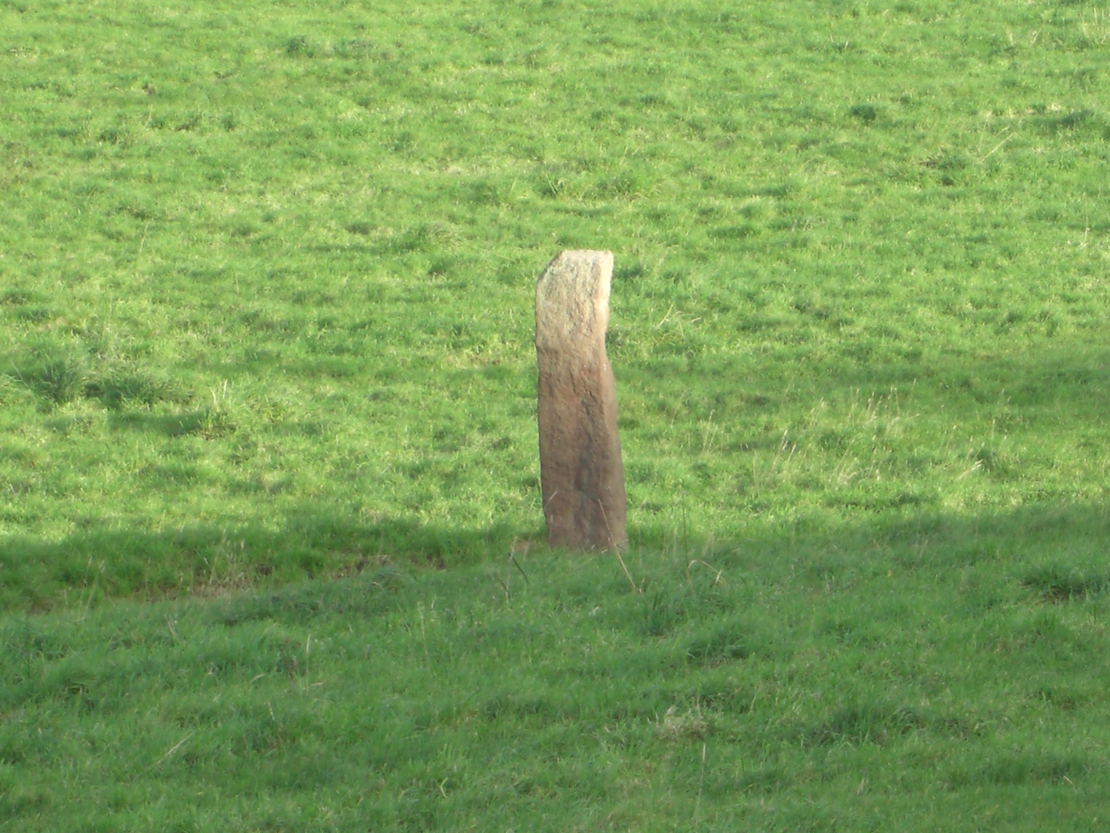 Petit menhir de la hague ou gratte dos utiliser dans les champs où nul arbre n'est planté afin que les bêtes puissent se gratter